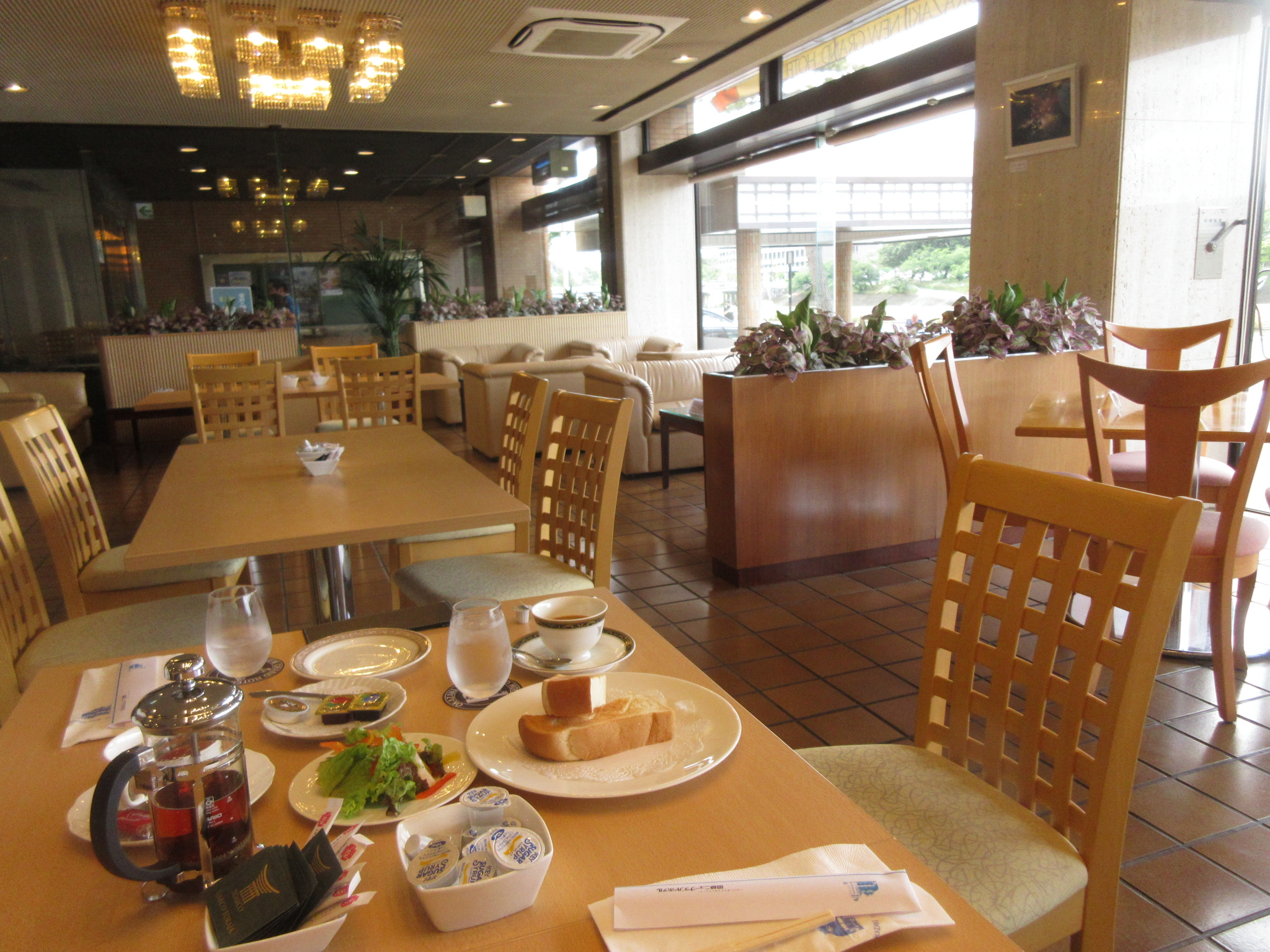 岡崎ニューグランドホテル（岡崎市康生町）